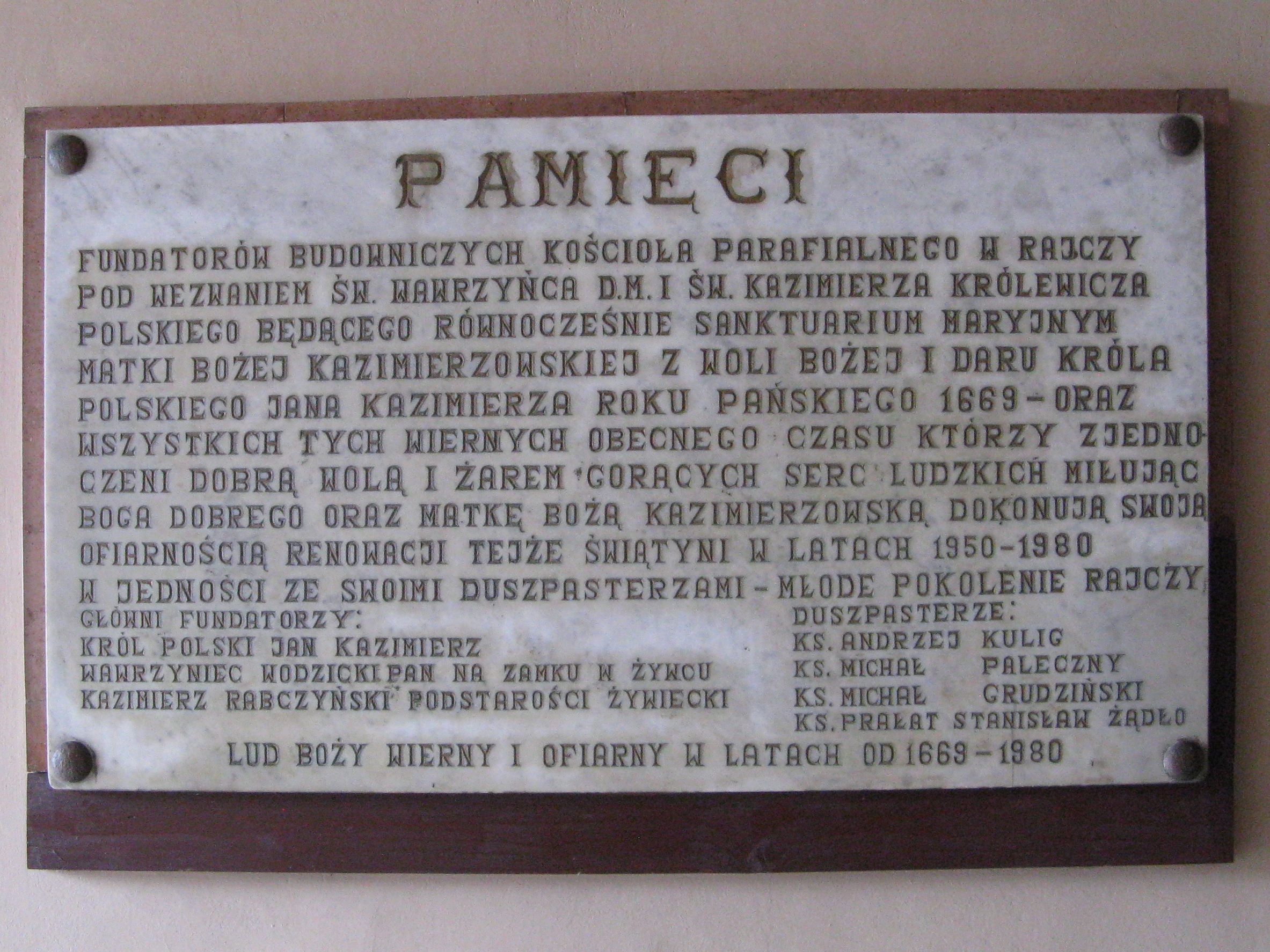 Tablica poświęcona osobom zaangażowanym w budowę kościoła w Rajczy wisząca na ścianie kruchty tegoż kościoła.